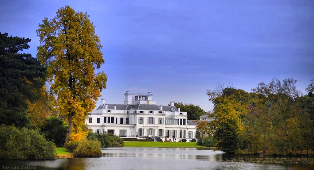 paleis Soestdijk